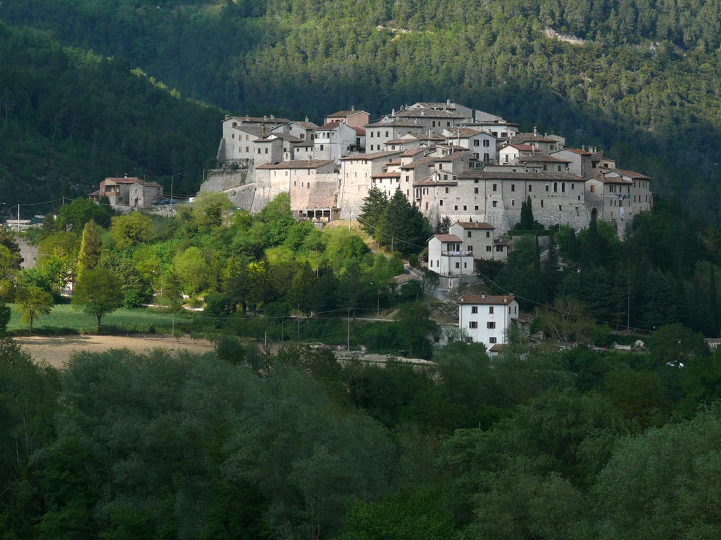 Castel San Felice, Sant'Anatolia di Narco, Perugia, Umbria, Italy, view